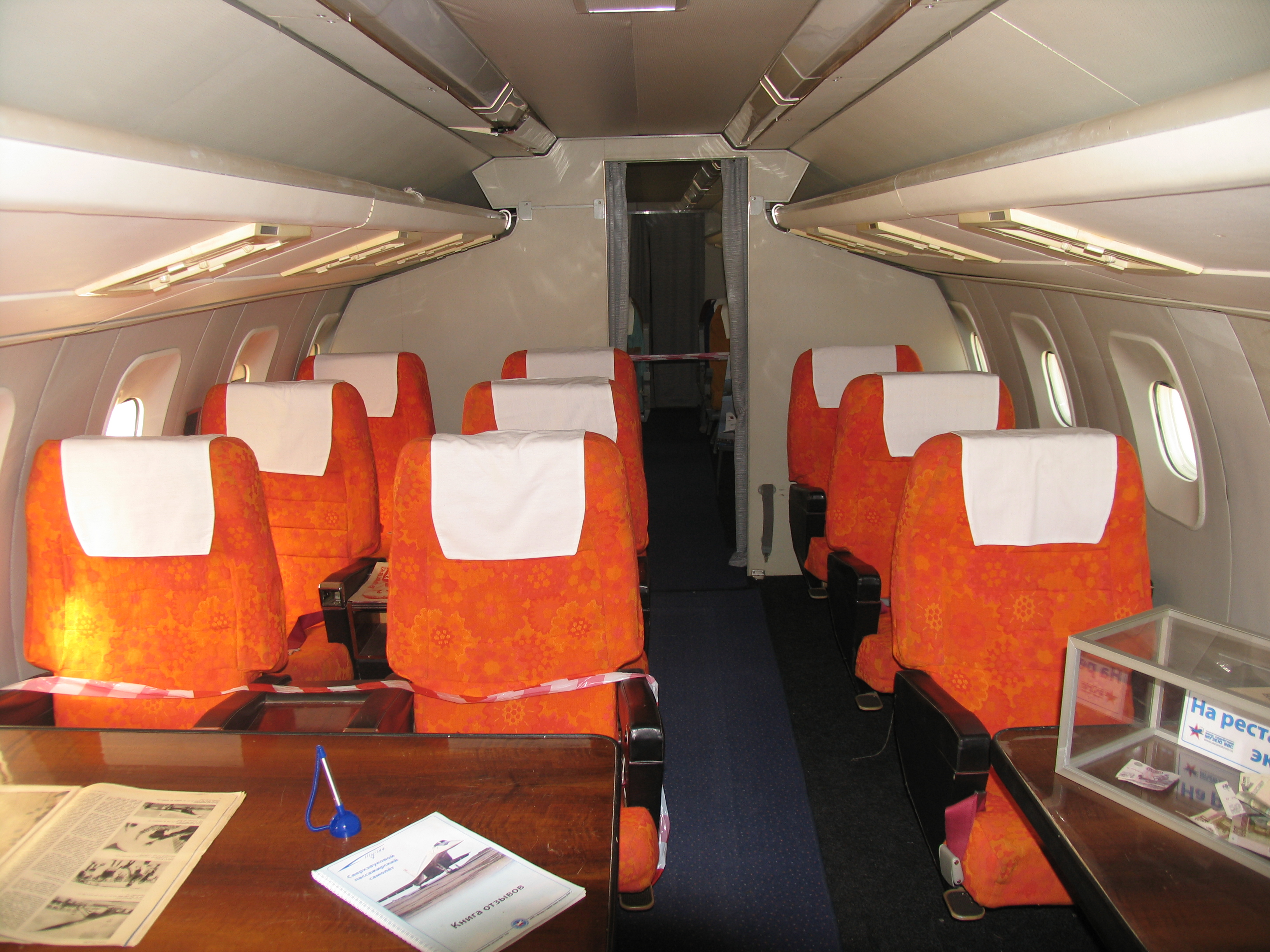 Салон первого класса самолёта Ту-144.